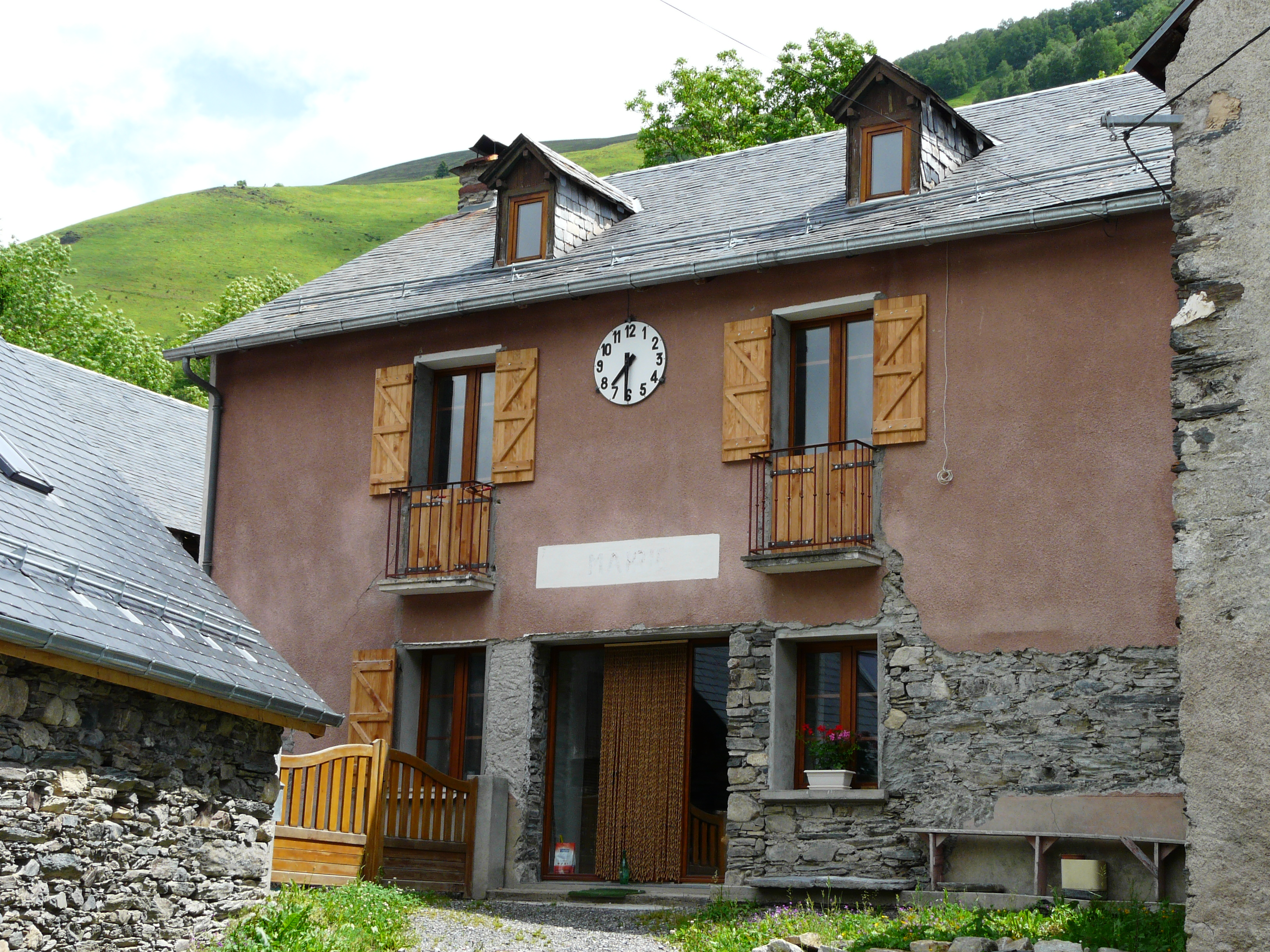 L'ancienne mairie de Mayrègne, Haute-Garonne, France.